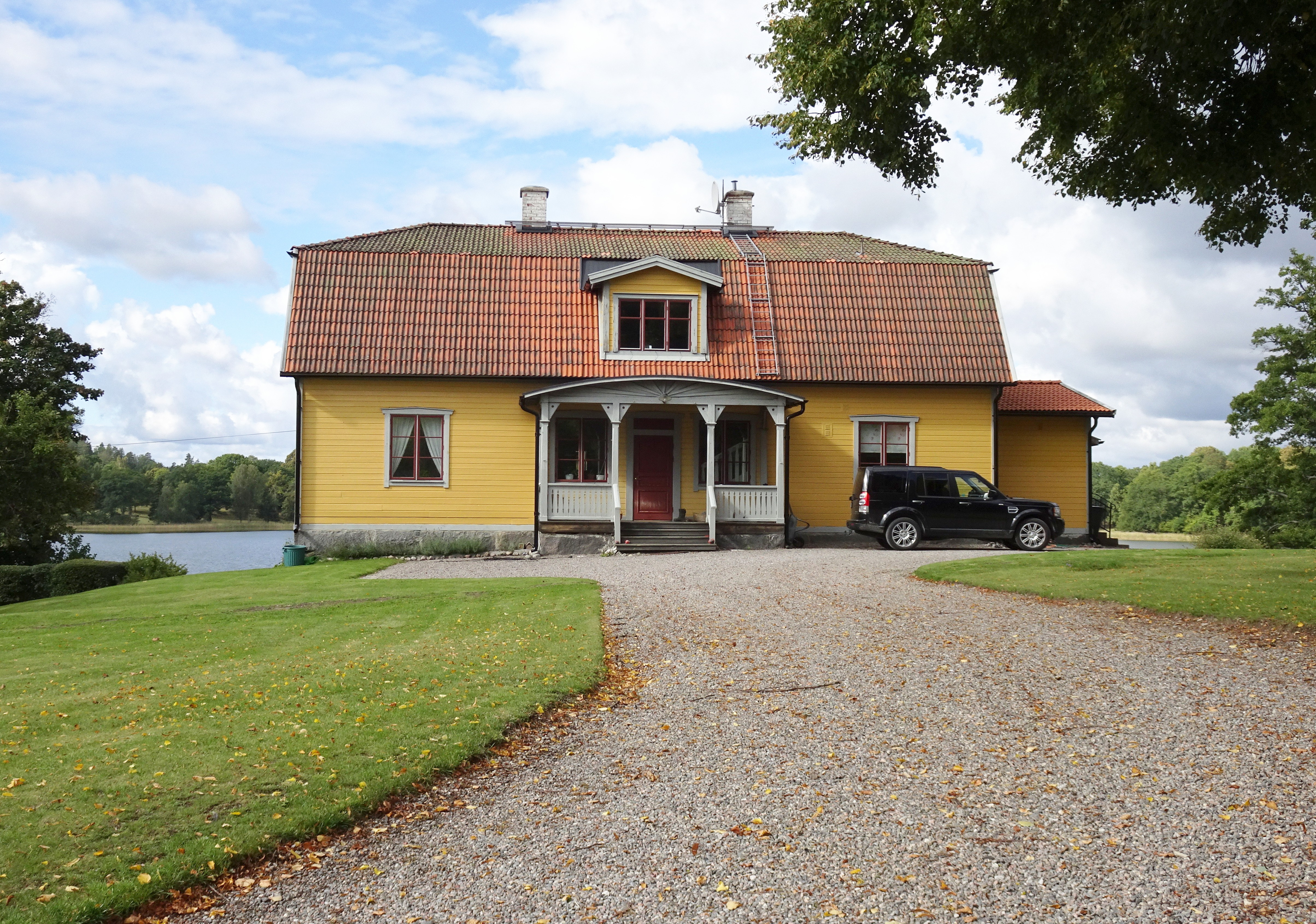 Herrökna gård, huvudbyggnad